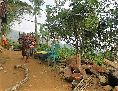 Parami, Atsabe, Ermera, Osttimor